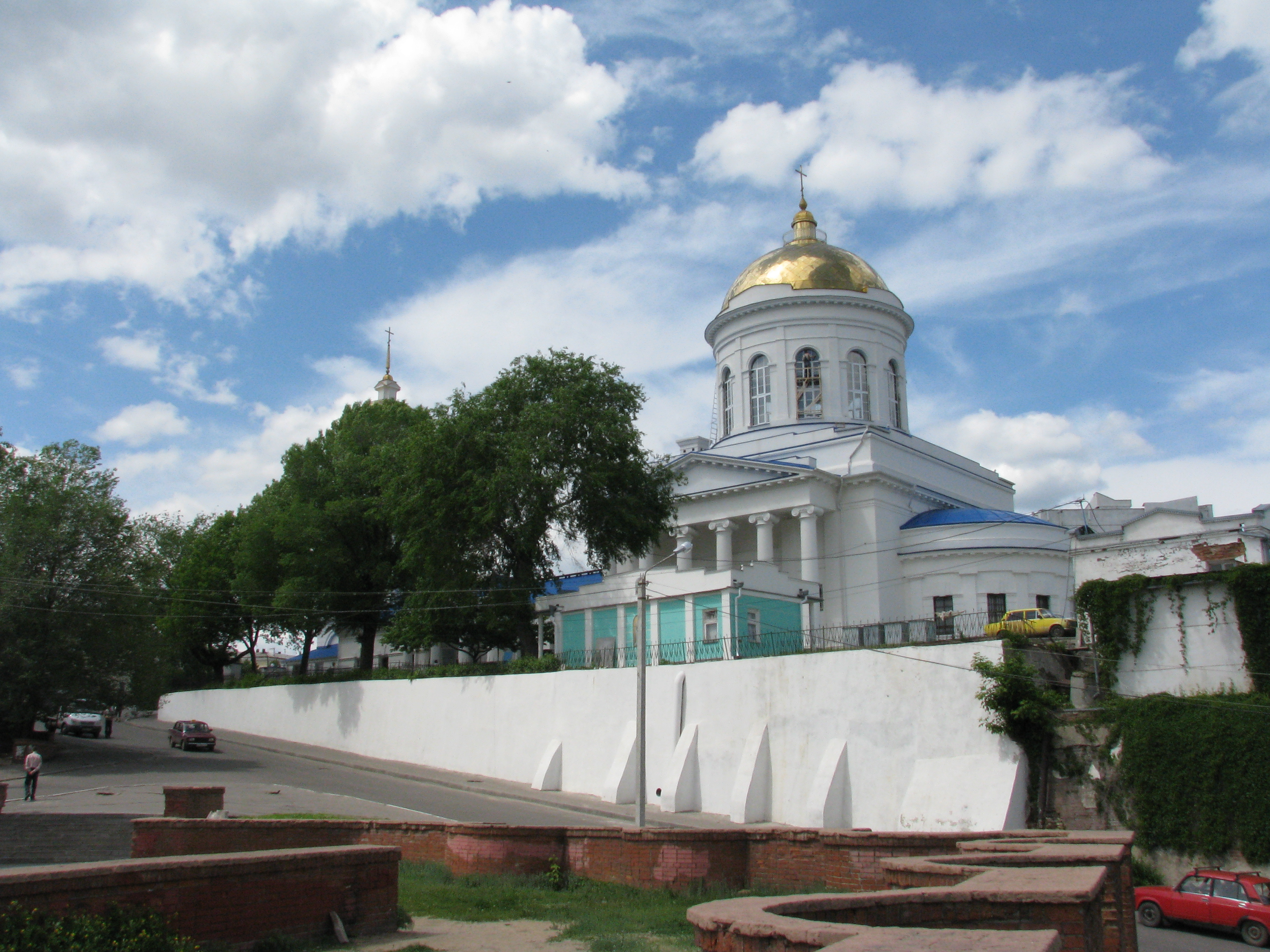 Покровский собор, Воронеж